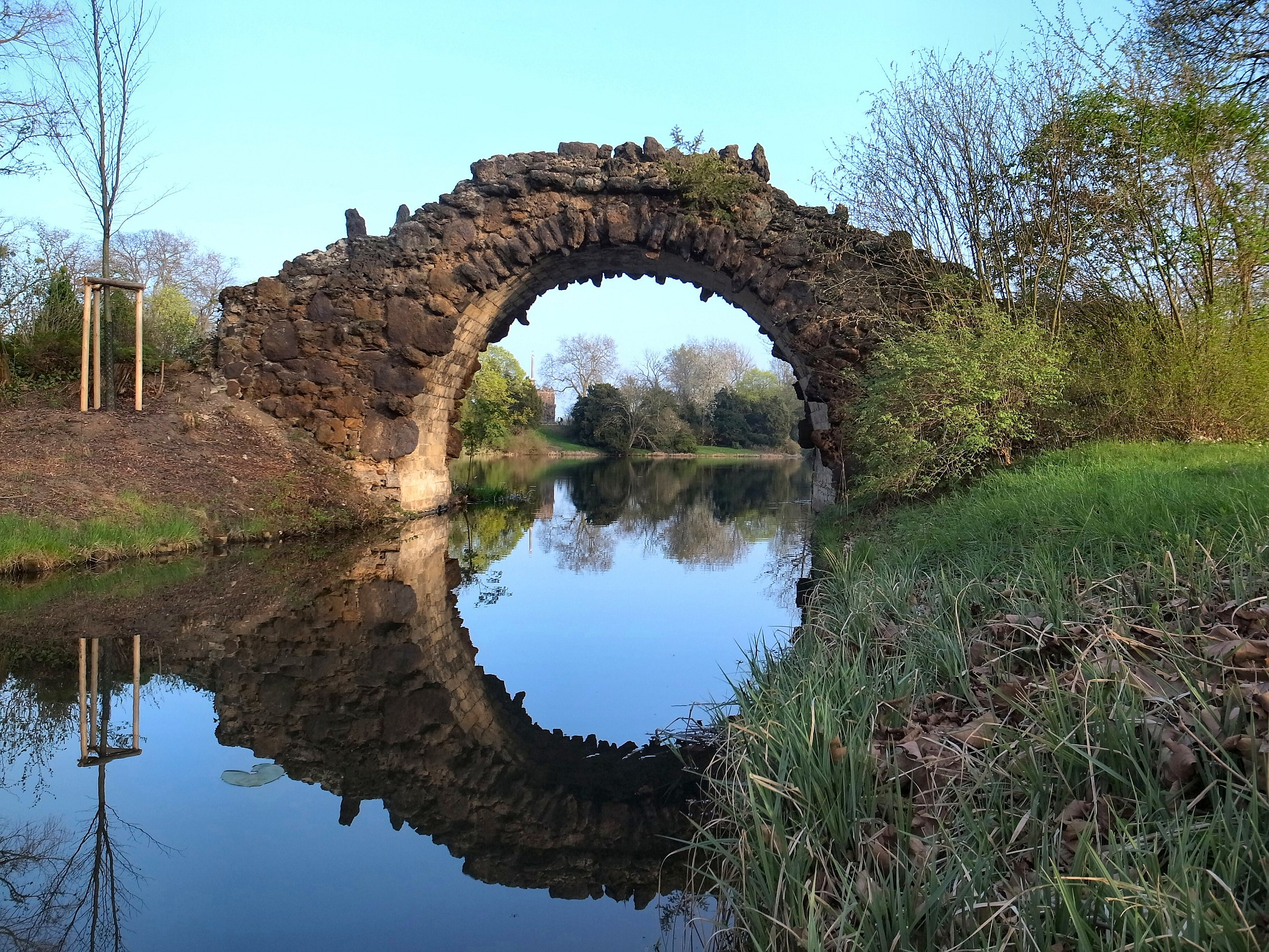 Wörlitz,Hohe Brücke